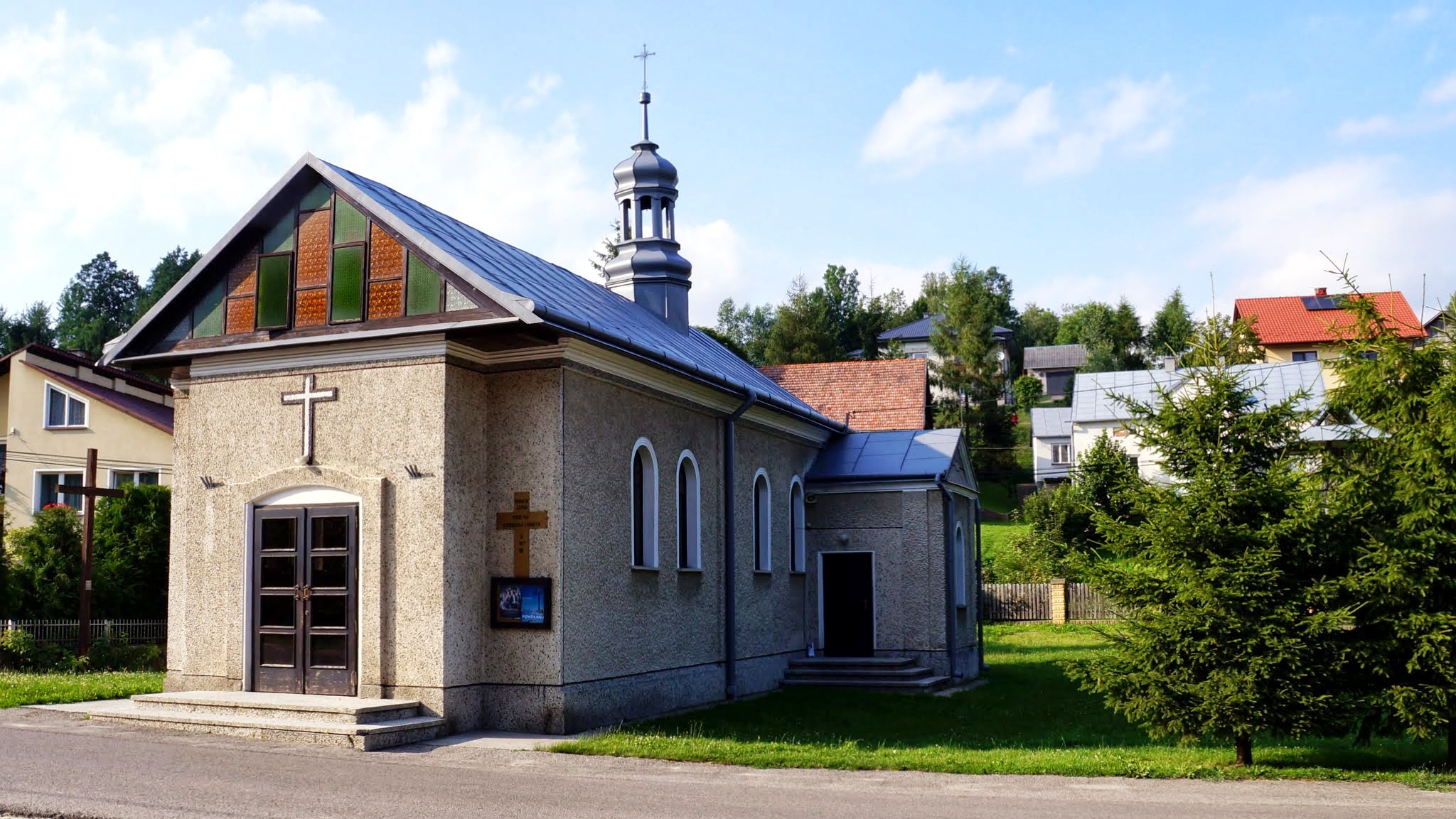 Lecka - "stary" Kościół Parafialny